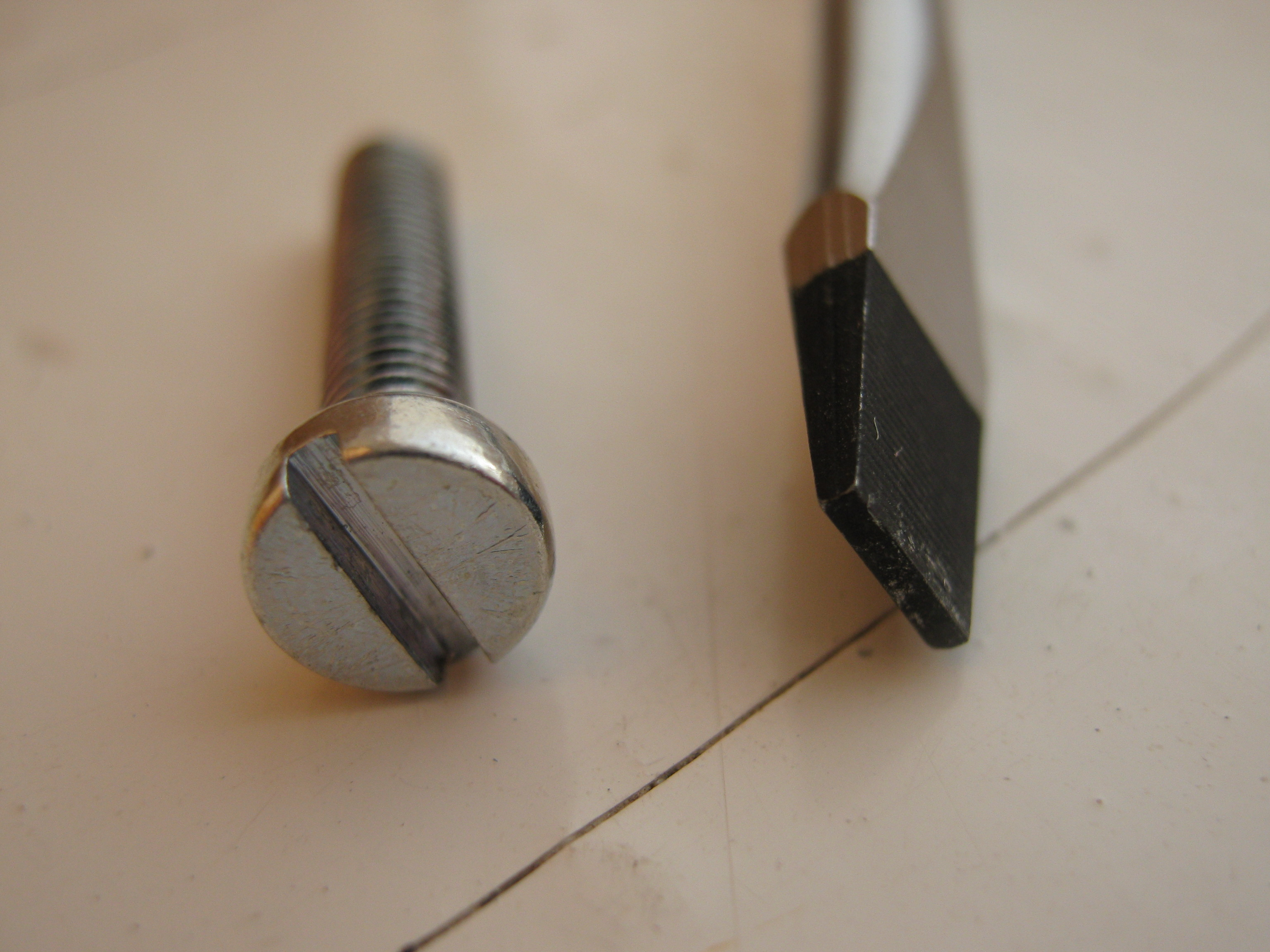 Винт и отвёртка с прямым шлицем